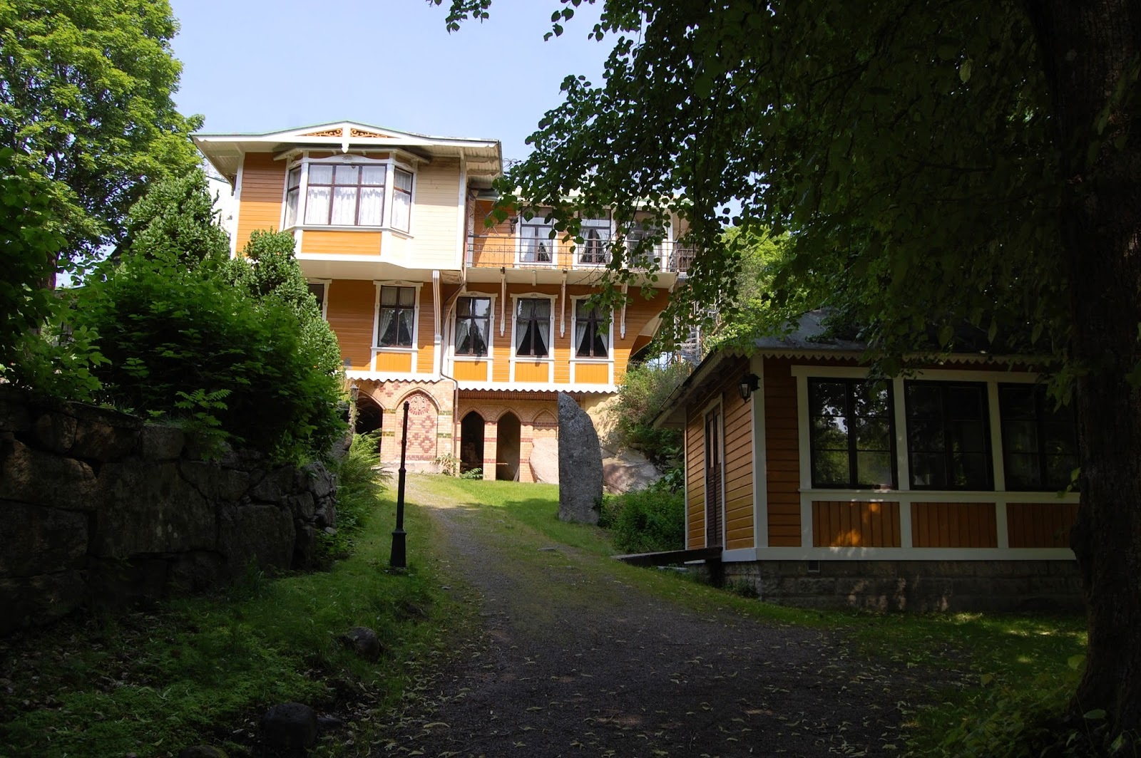 Ture Malmgrens hem Villa Elfkullen i Uddevalla. Uppfört 1887-1902